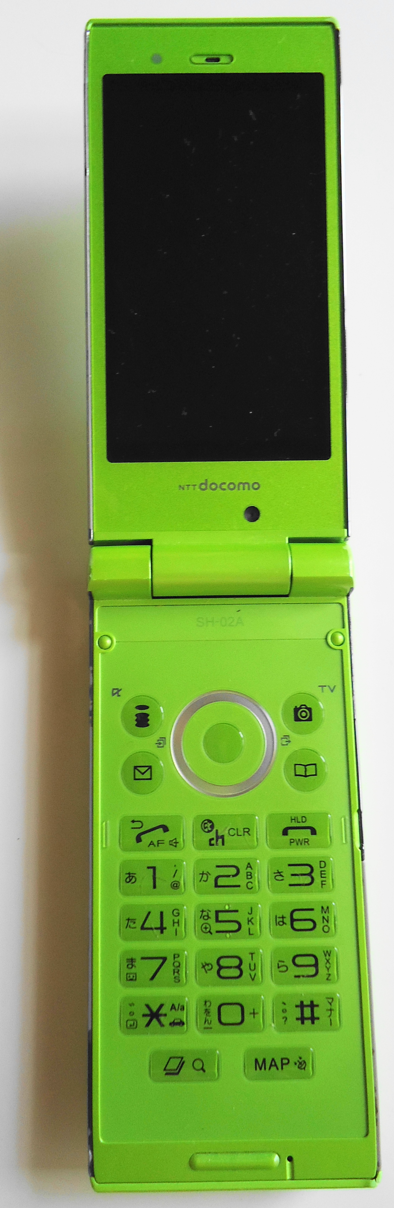 NTTドコモ SH-02A (ライムグリーン) 開いた状態